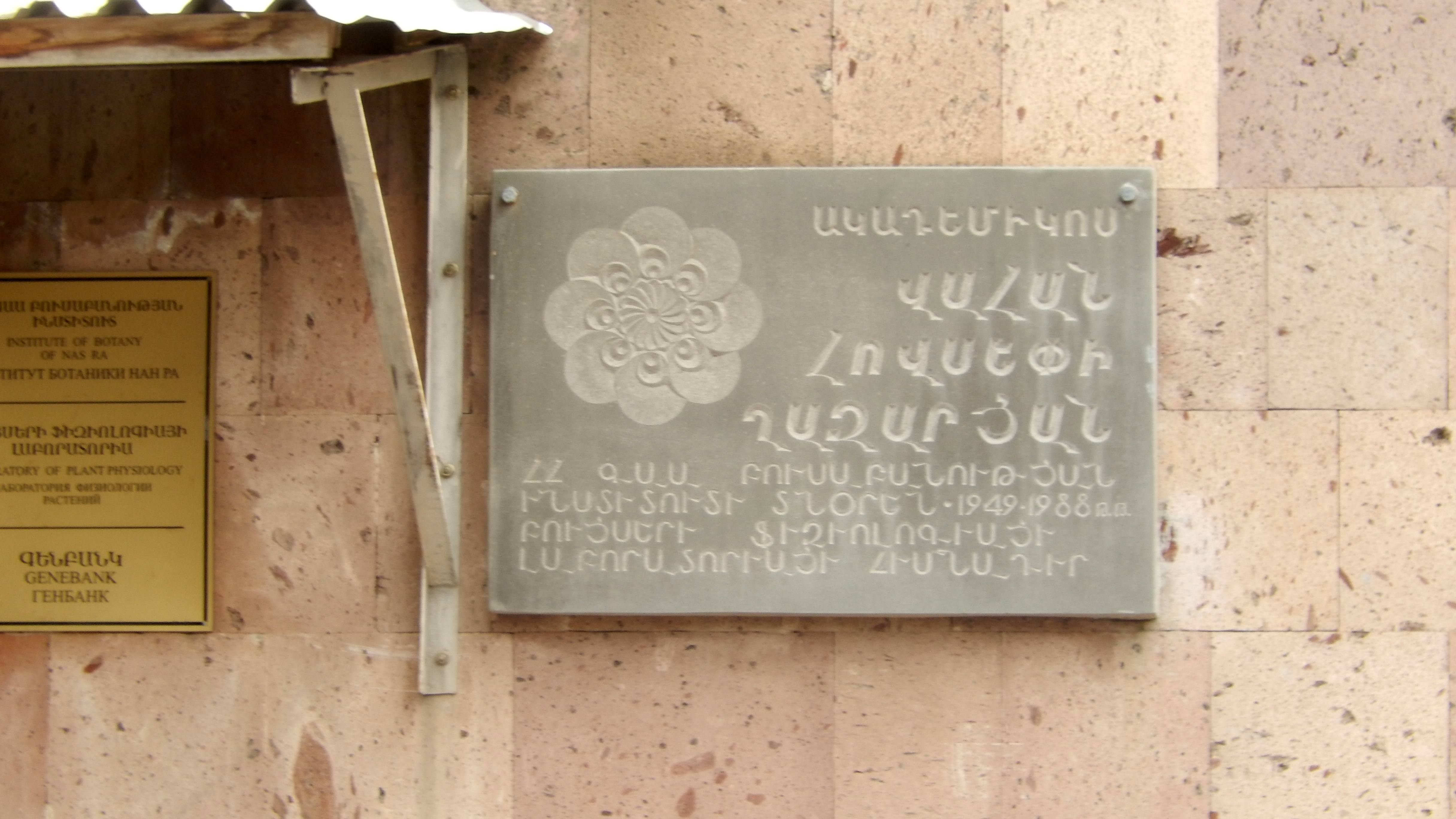 Երևանի բուսաբանական այգի 8/1